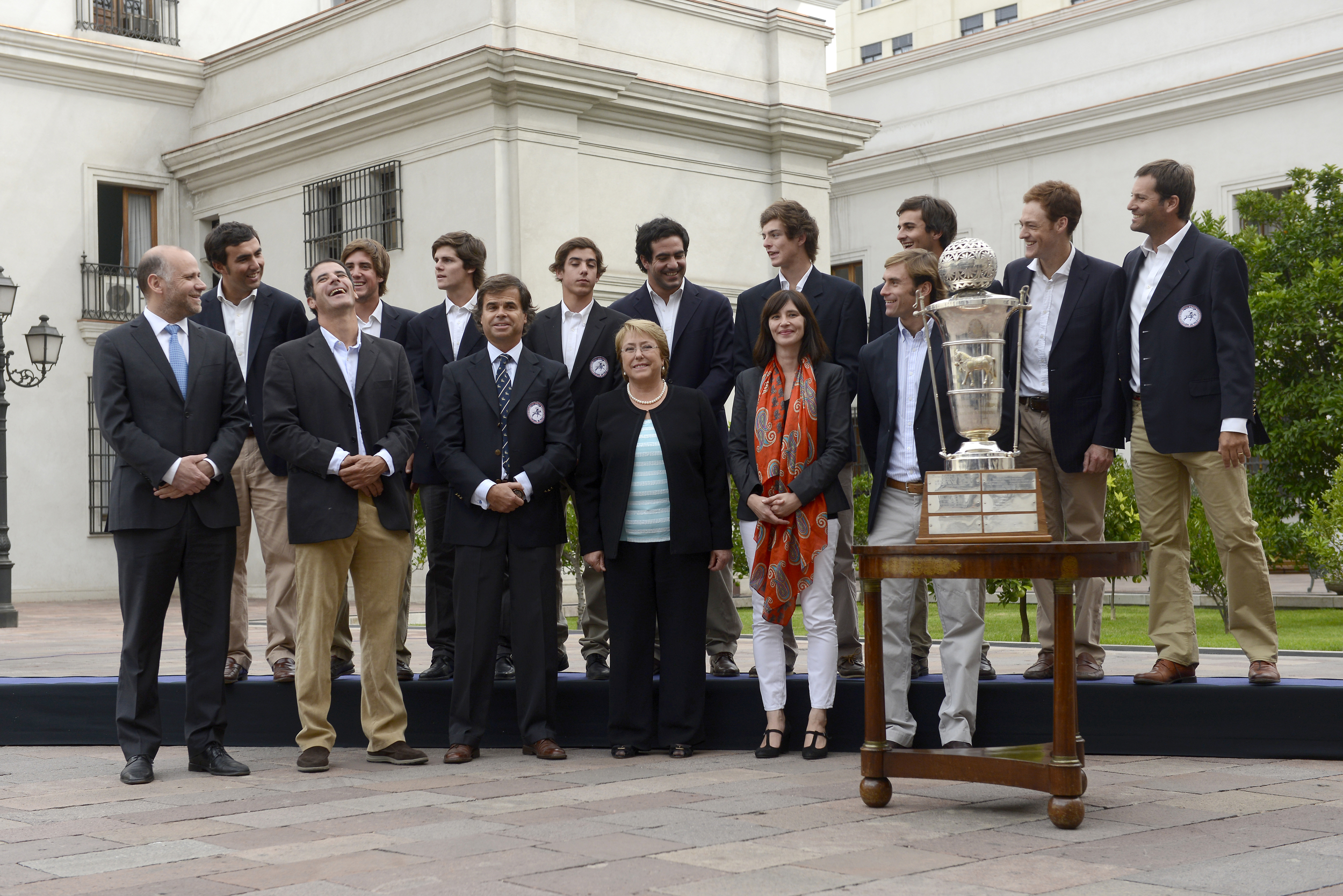 15 Abril 2015, Ministro Álvaro Elizalde junto a la Presidenta Michelle Bachelet reciben al Equipo Campeón Mundial de Polo en La Moneda.